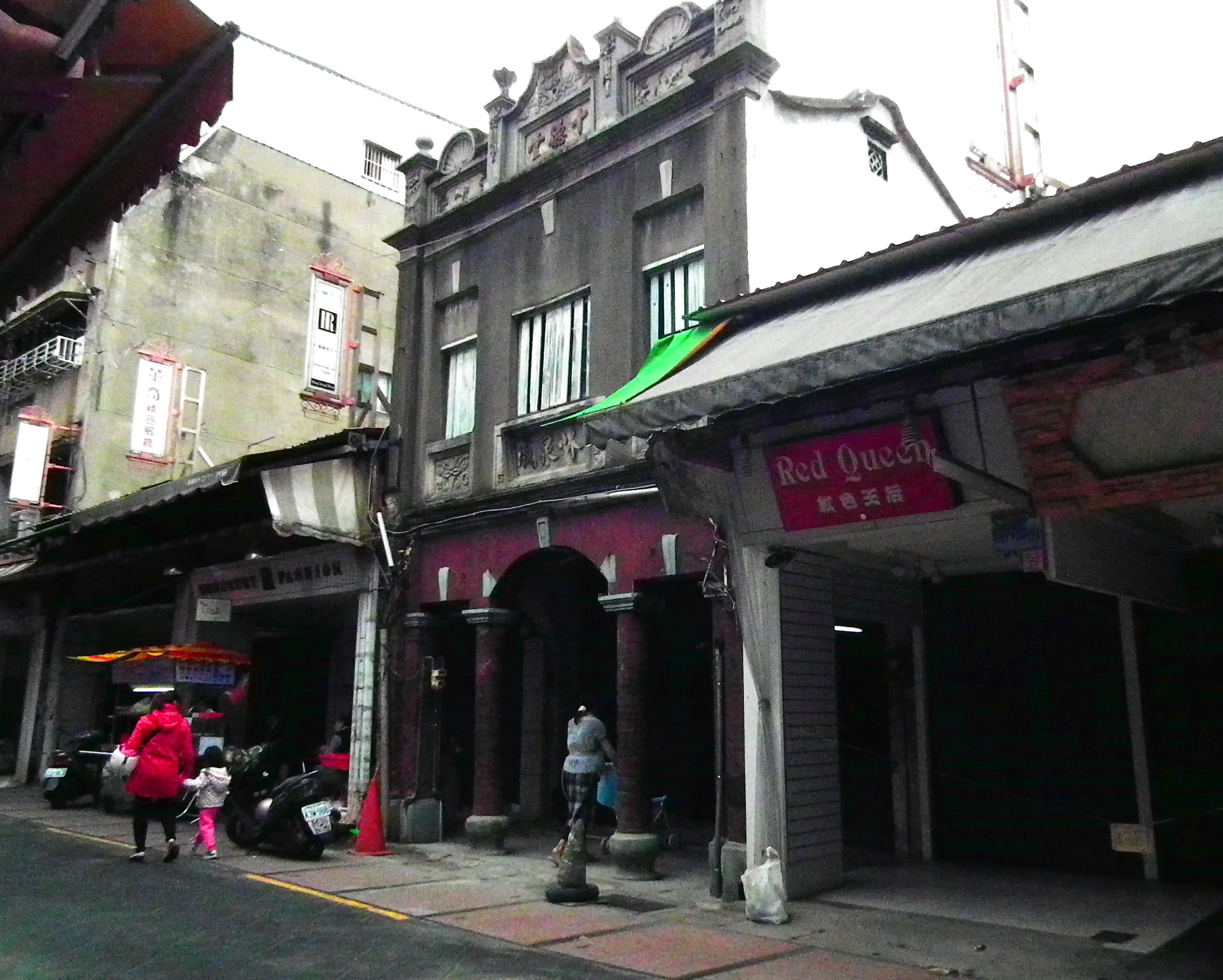 十德堂 Shidetang